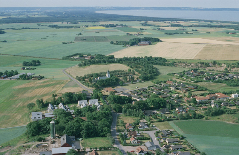 Eldsberga kyrka i bakgrunden. Bilden är tagen mot (väderstreck): SSV Motiv: Eldsberga Nyckelord: Flygbilder, Riksintressen Kategori: Bymiljö, Miljöer, OdlingslandskapEldsberga kyrka i bakgrunden. Bilden är tagen mot (väderstreck): SSV.